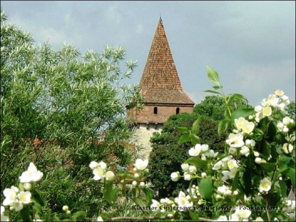 Baszta Opacka w Sulejowie